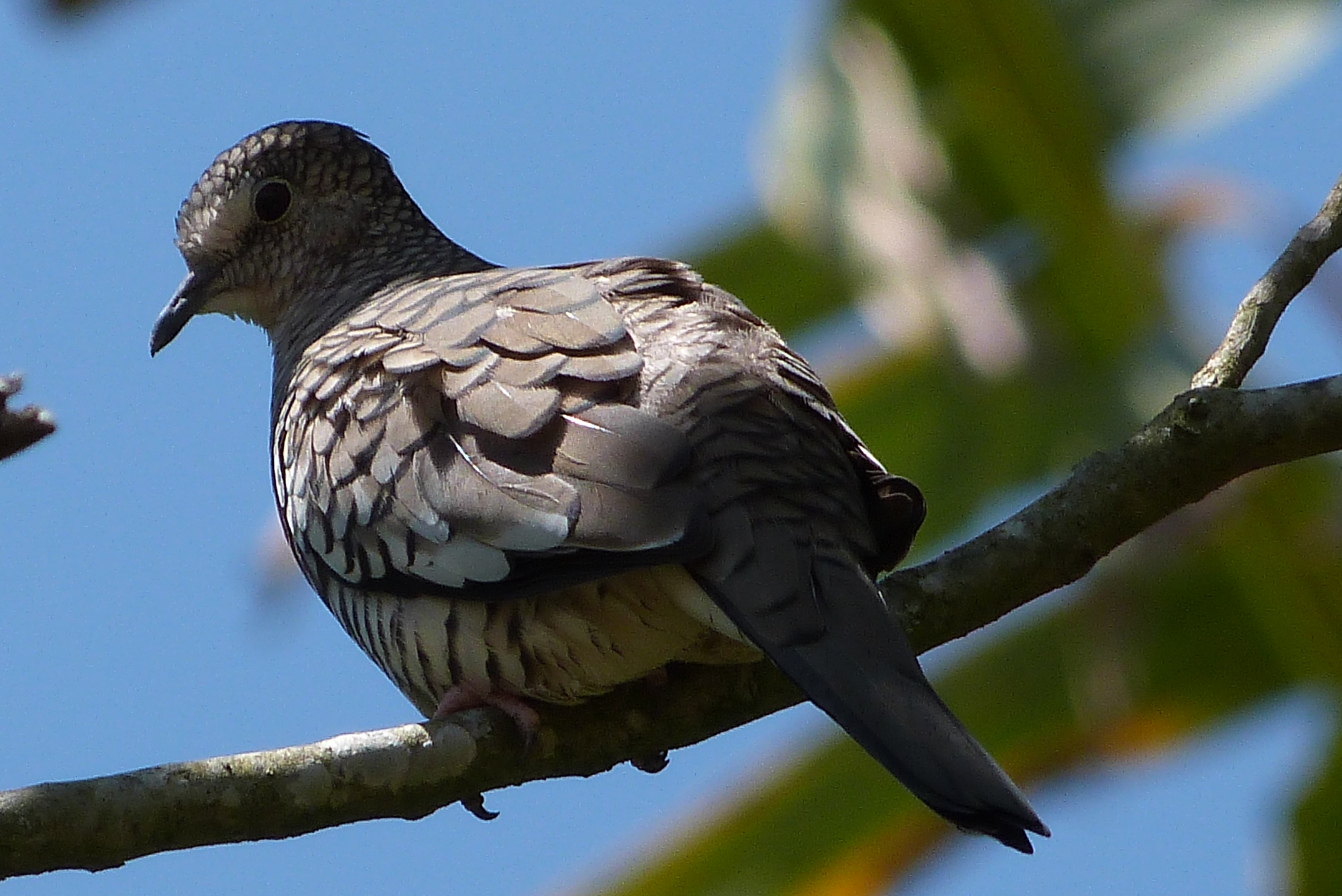 Foto tirada em Entre Rios - MG